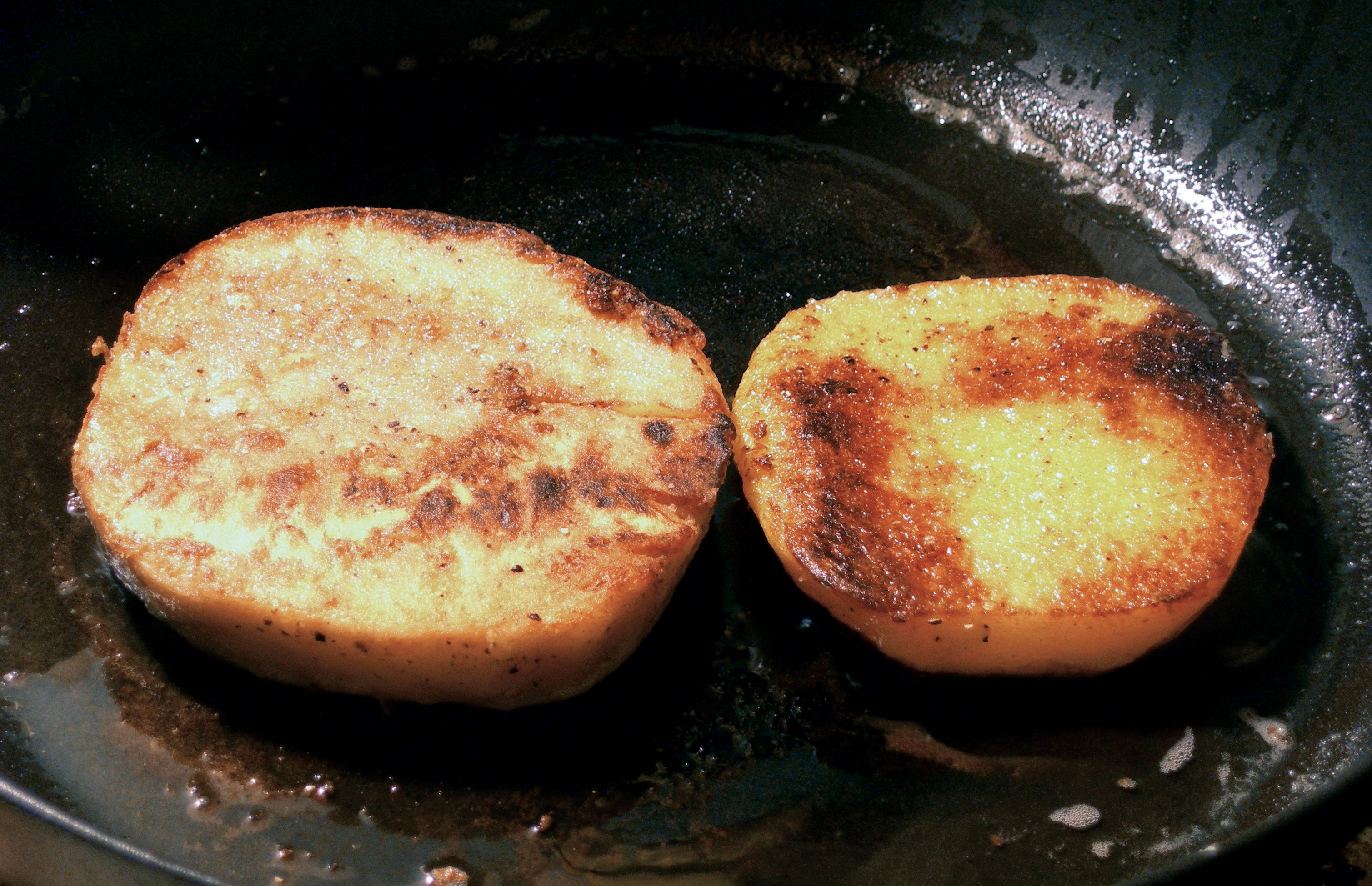 Fried slices of celery root and turnip Gebratene Sellerie- und Steckrübenschnitzel